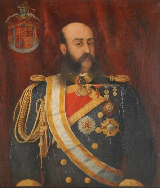 El retrato representa al almirante José María Diego de León (1827-1887), conde de Belascoain y alcalde de Madrid. Aparece vestido de almirante, con la banda de la Orden de Isabel la Católica y condecoraciones civiles y militares al pecho. Fue hijo del teniente general Diego de León, fusilado en 1841. Fue diputado a Cortes por Madrid en las legislaturas 1857-1858 y 1864-1865 y durante su mandato como alcalde organizó los Servicios de Incendios y creó la Junta Facultativa Municipal para regularizar los asentamientos.